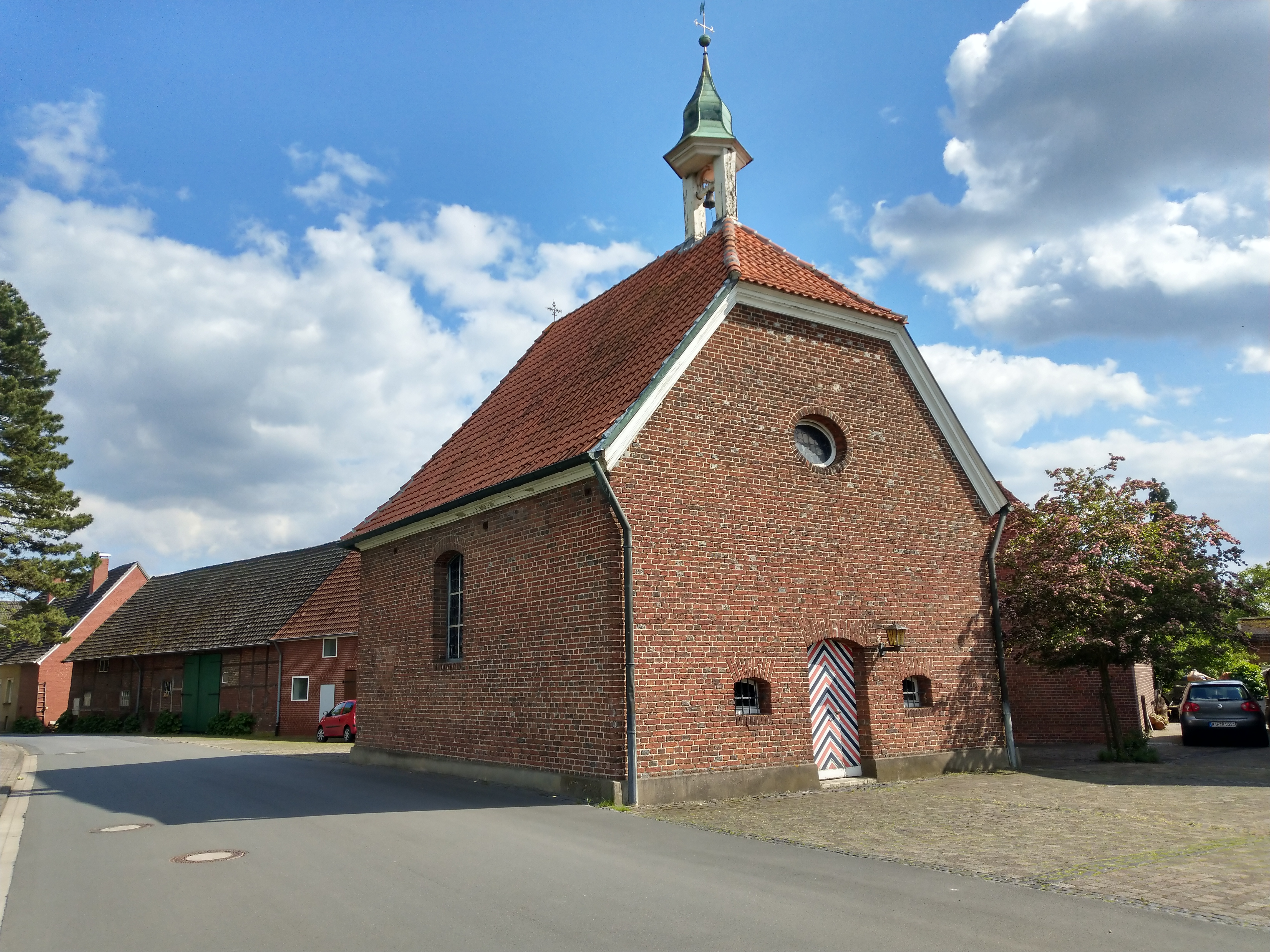 Seitenansicht auf die Kapelle